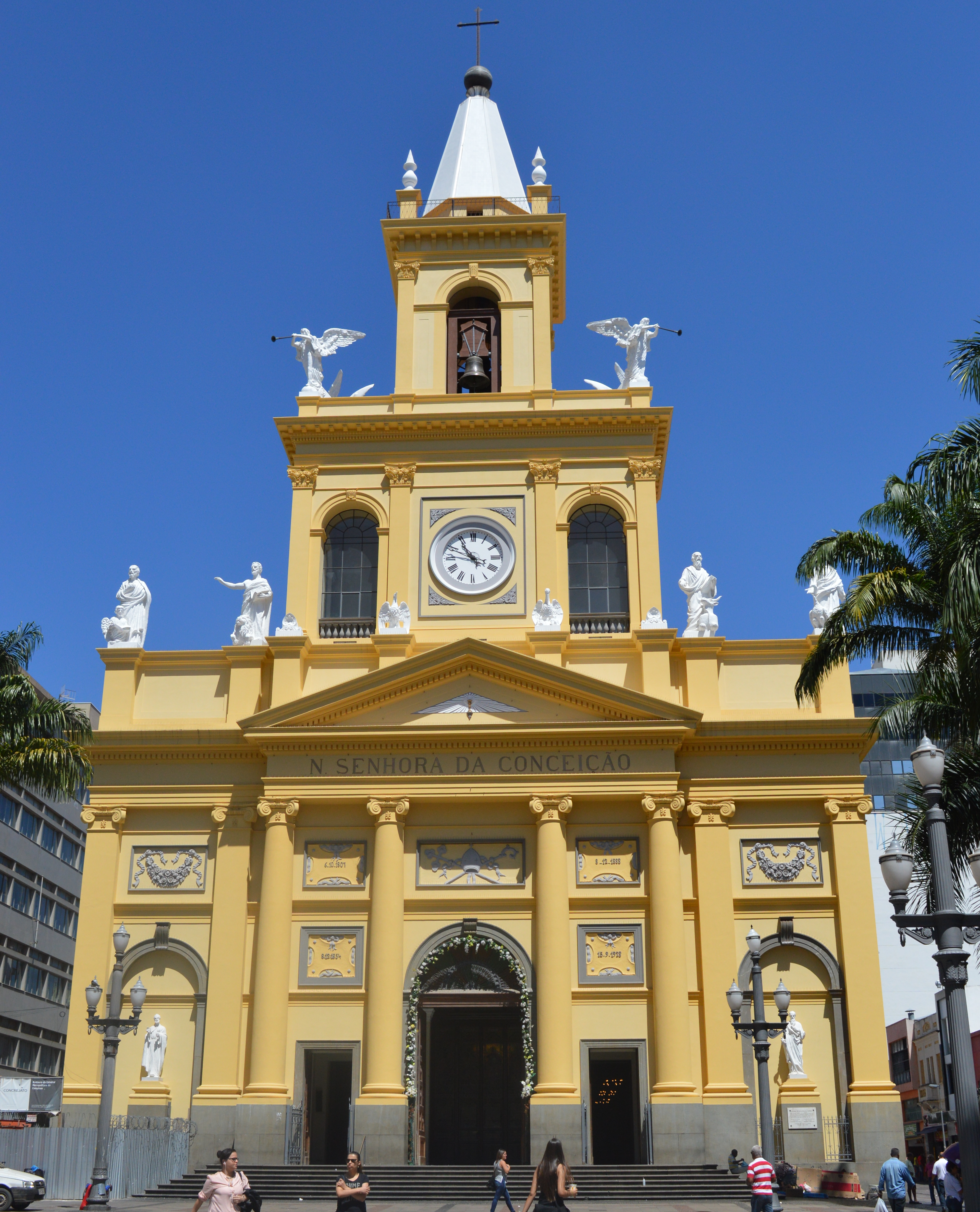 Catedral Metropolitana, Principal igreja católica no centro de Campinas-SP.